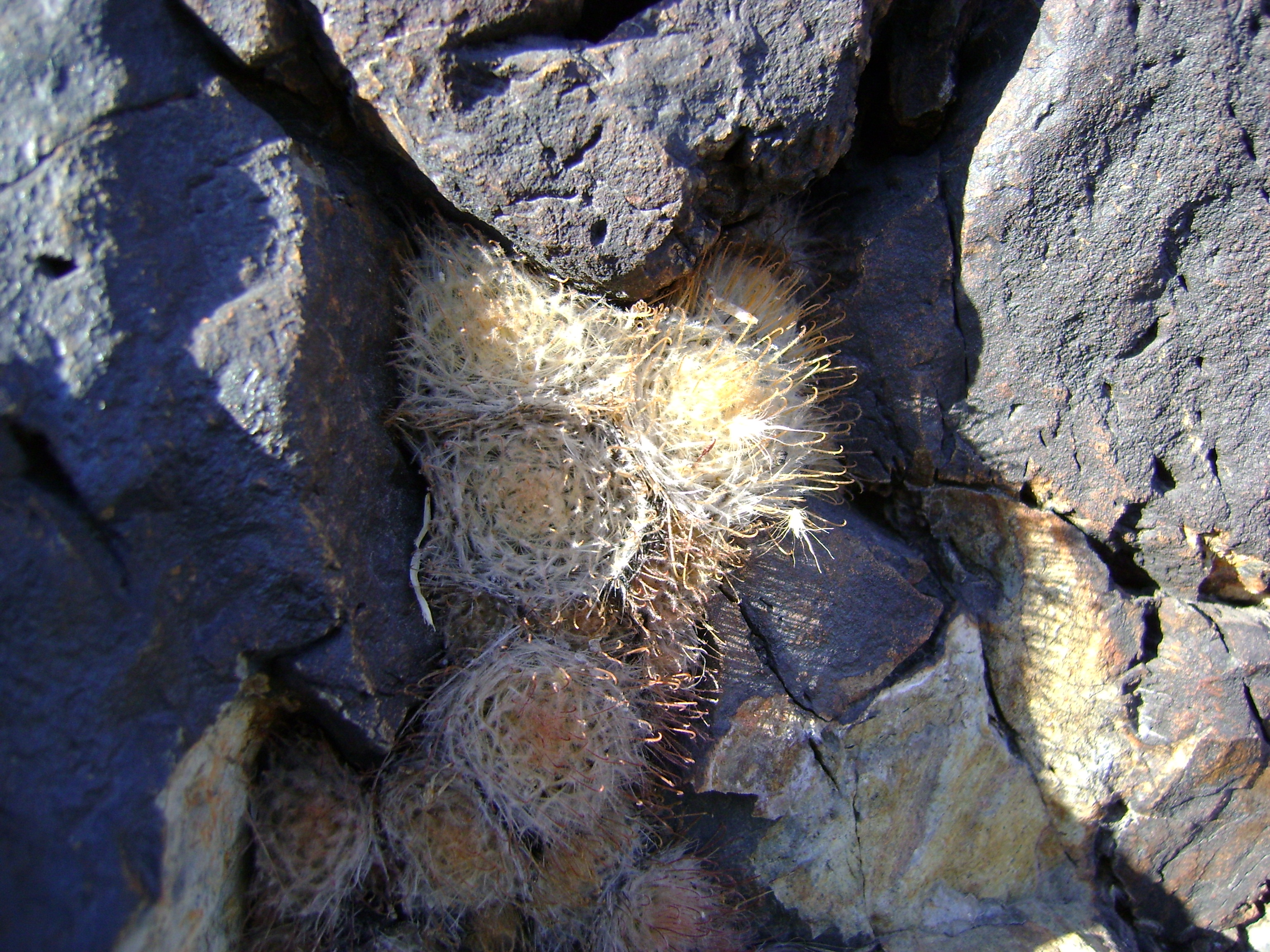 Bermejillo to Mapimi, Durango